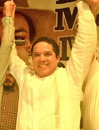 Evodio Velázquez, Carlos Navarrete y Beatriz Mojíca